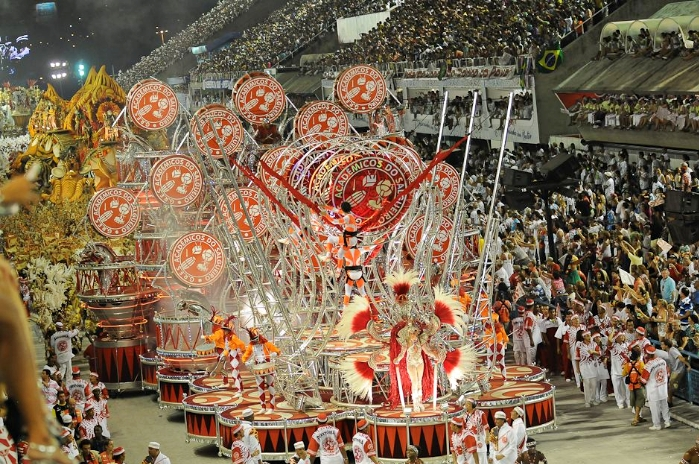 Rio de Janeiro - Desfile Academicos do S. em 2005. (André Telles)